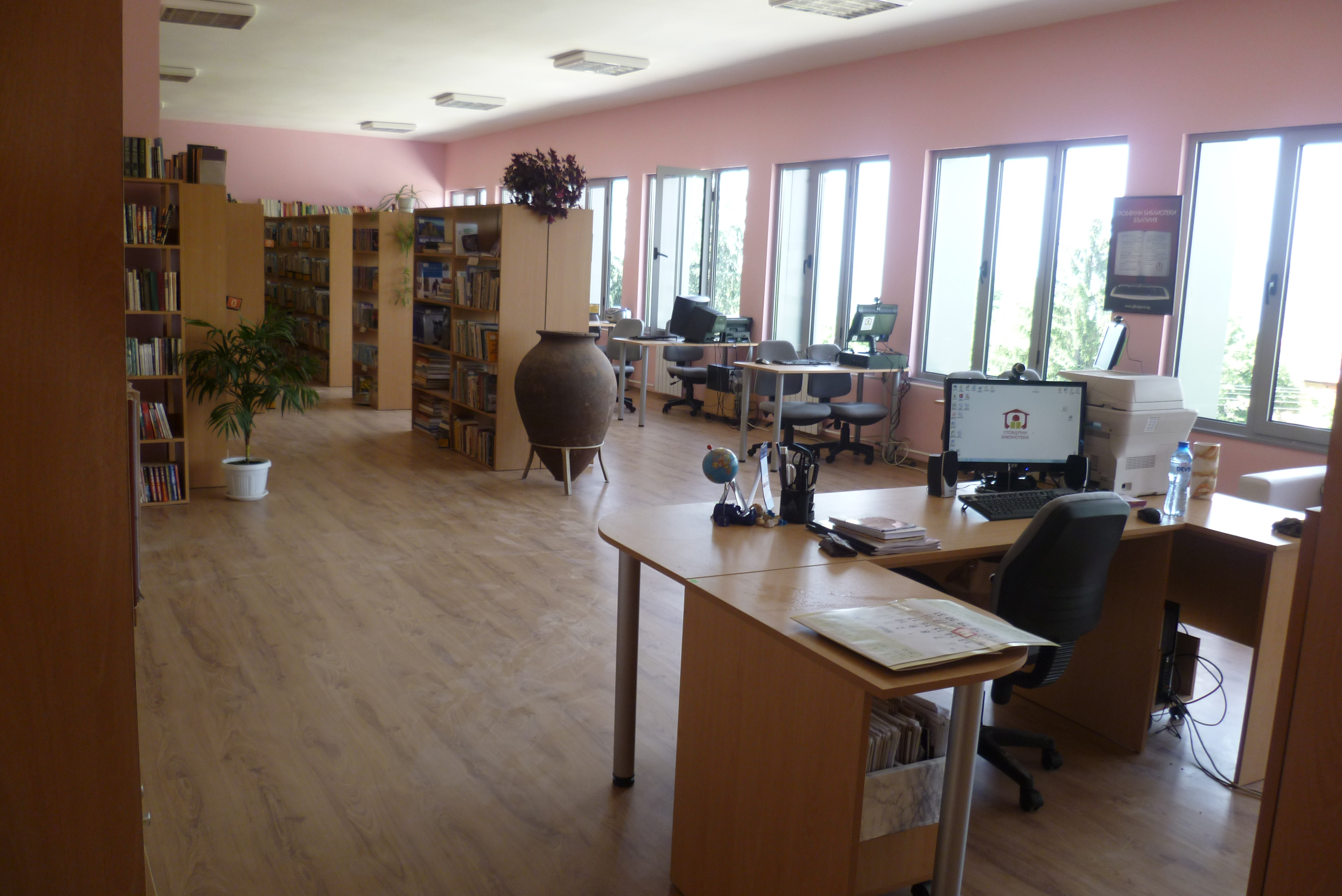 Библиотека към НЧ "Просветен лъч-1905" гр. Сапарева баня, ул. "германея" №1